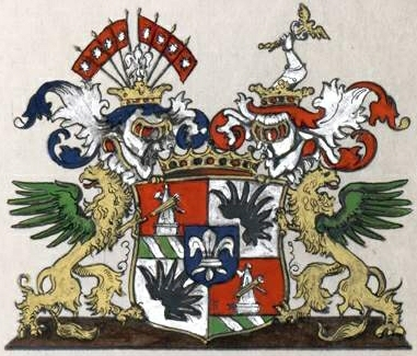 Dellingshauseni suguvõsa vabahärravapp